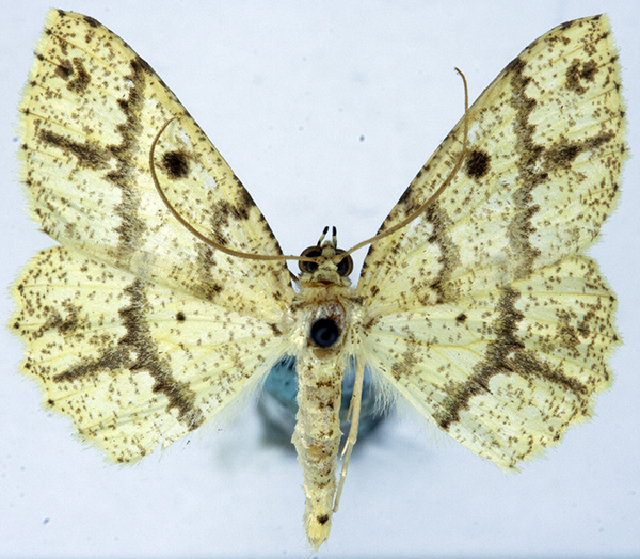 Synegia decolorata incepta